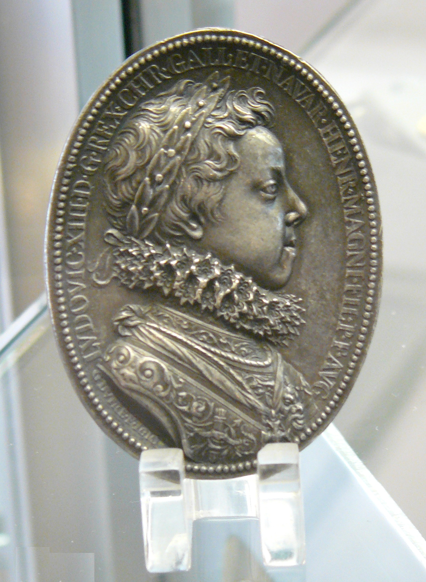 Médaille en argent "Louis XIII enfant". Ovale 56x42 mm, Revers : M de Médicis en Minerve élève un rameau de laurier devant le jeune roi nu tenant un globe - ORIENS · AUGVSTI · TUTRICE · MINERVA - Mazerolle 663 cabinet des médailles, Paris